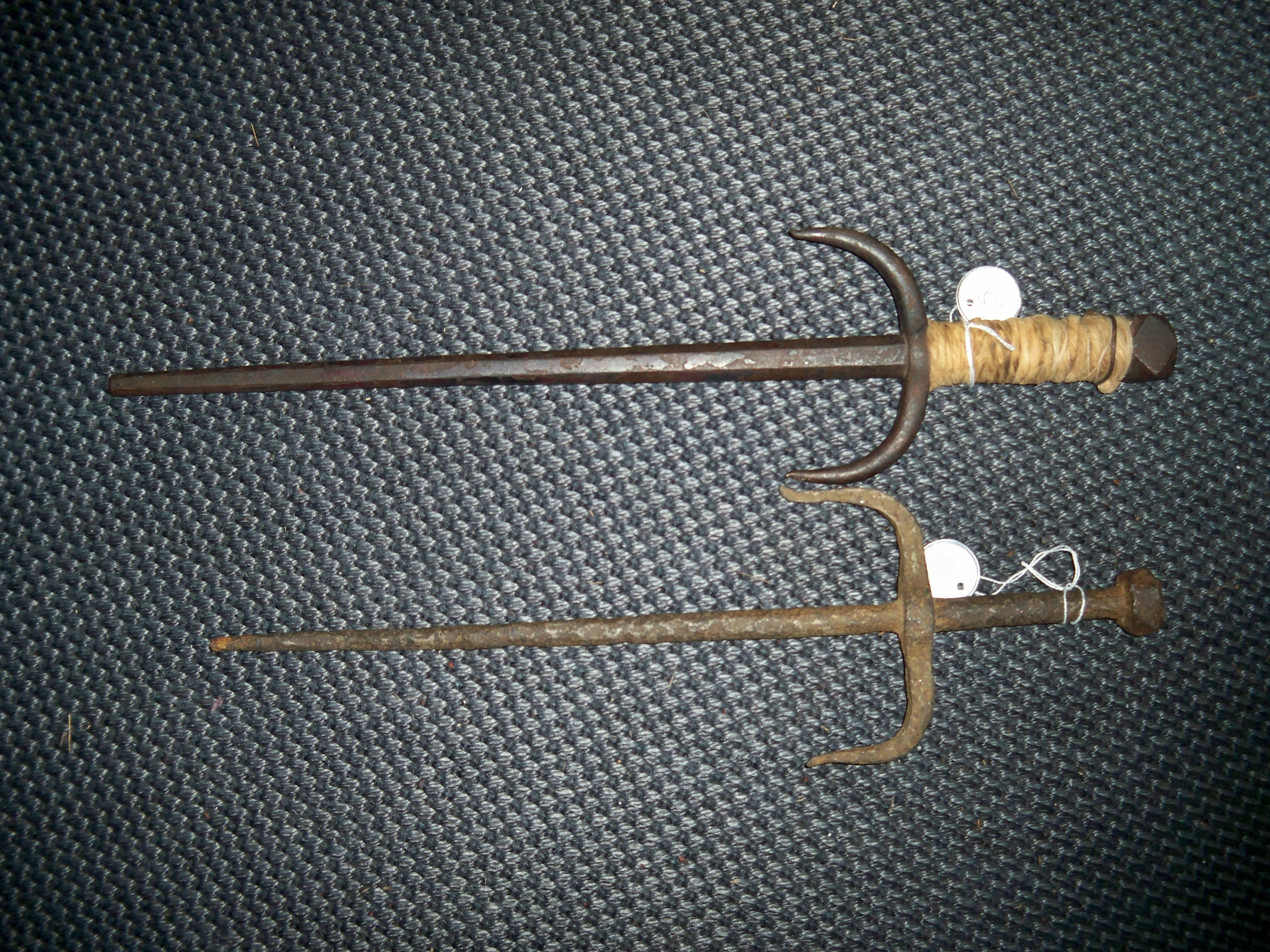 2 antique sai. Larger-Okinawan(Japanese)sai and smaller-Indonesian sai (tjabang)